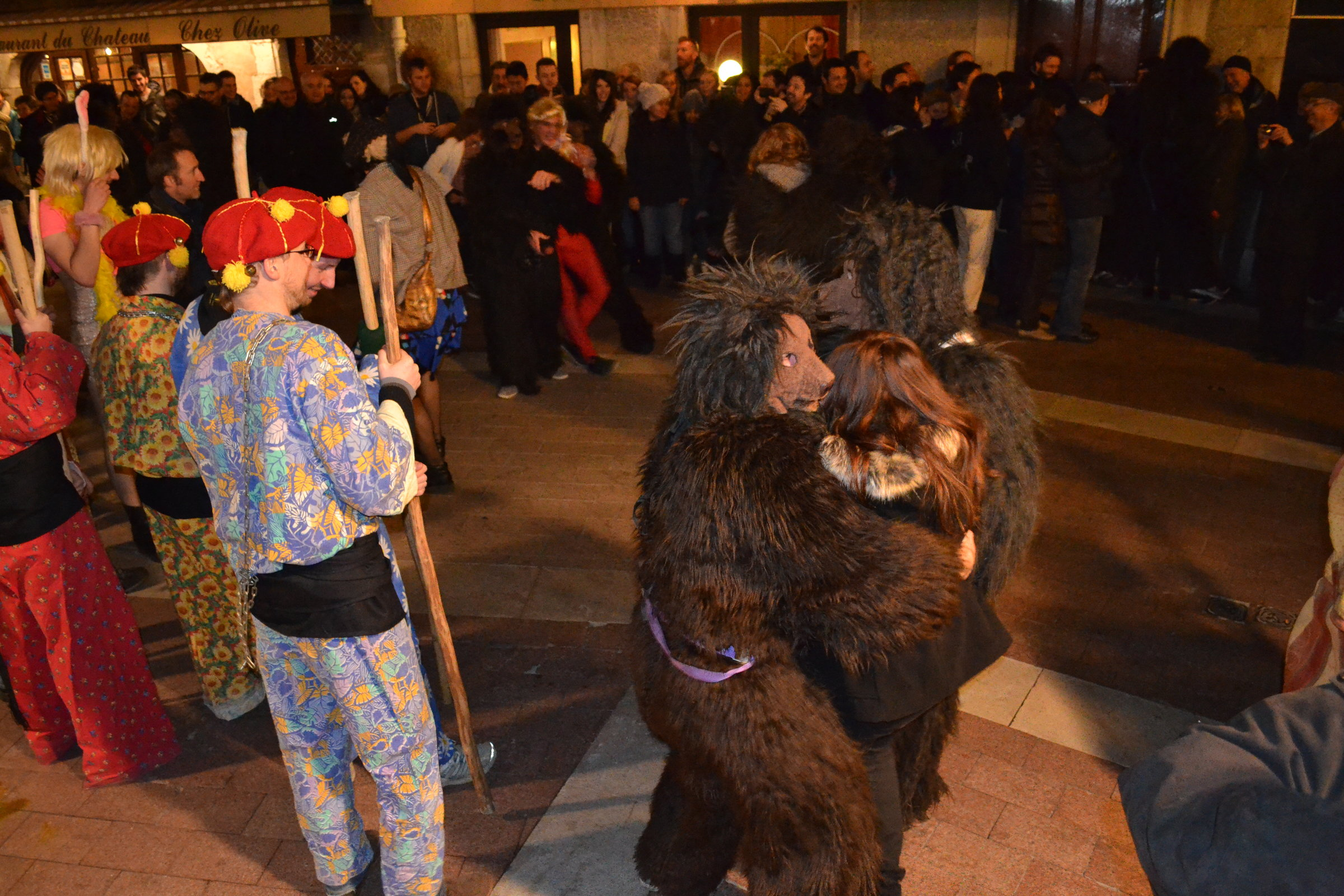 Caça a l'ors deu Carnaval Biarnés 2015.